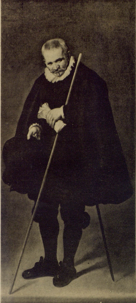 Fototipia de Hauser y Menet de 1922 del retrato de Francisco de Ocáriz y Ochoa, de Diego Velázquez, cuando estaba en la colección del marqués de Casa Torres, tomada de Anónimo, “La colección Casa Torres”, Boletín de la Sociedad Española de Excursiones, XXX (1922, 2º trimestre), p.56.